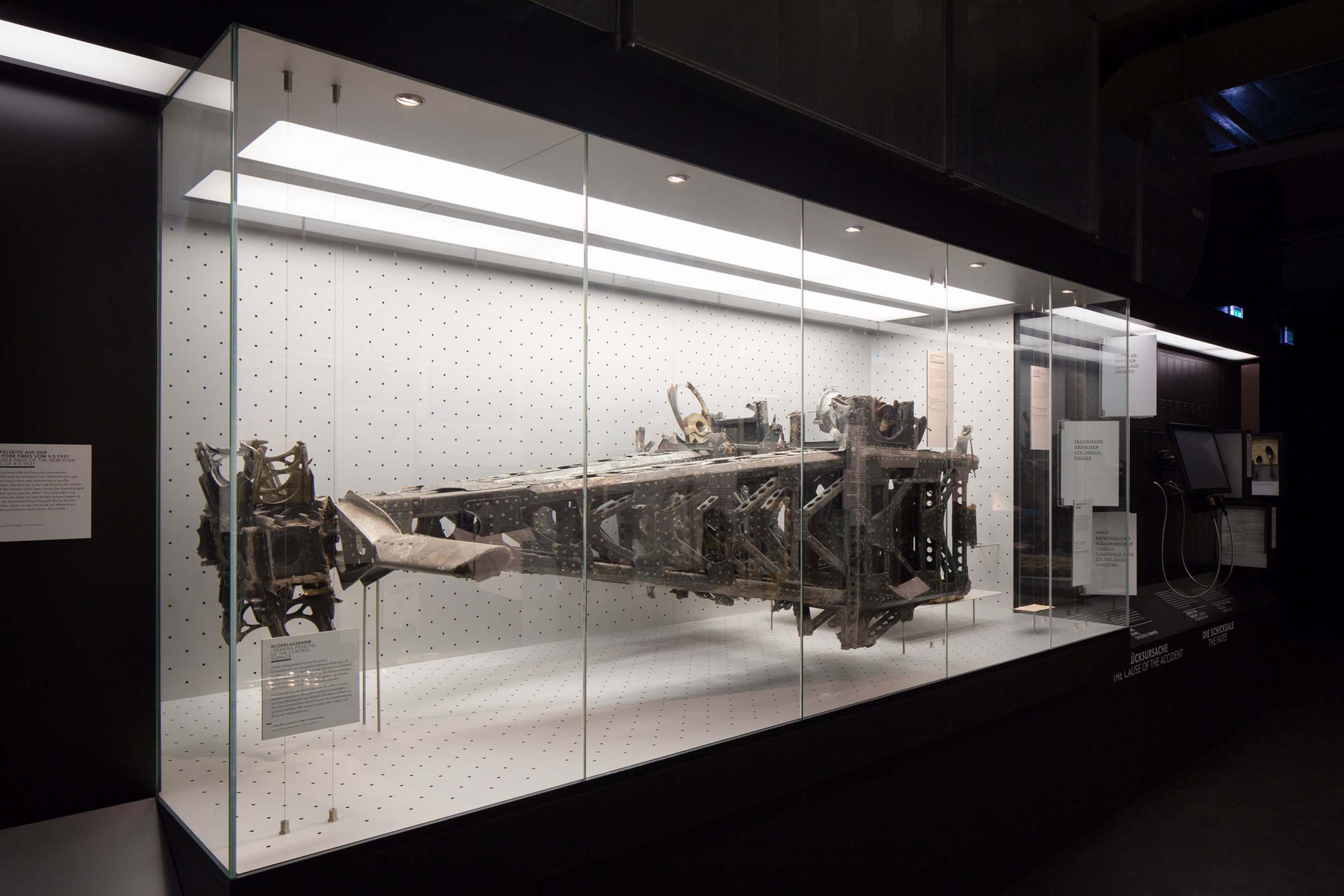 Ruderlagerarm von LZ 129 "Hindenburg", zerstört bei einem Brand beim Landemanöver in Lakehurst © Zeppelin Museum, Foto: Myrzik